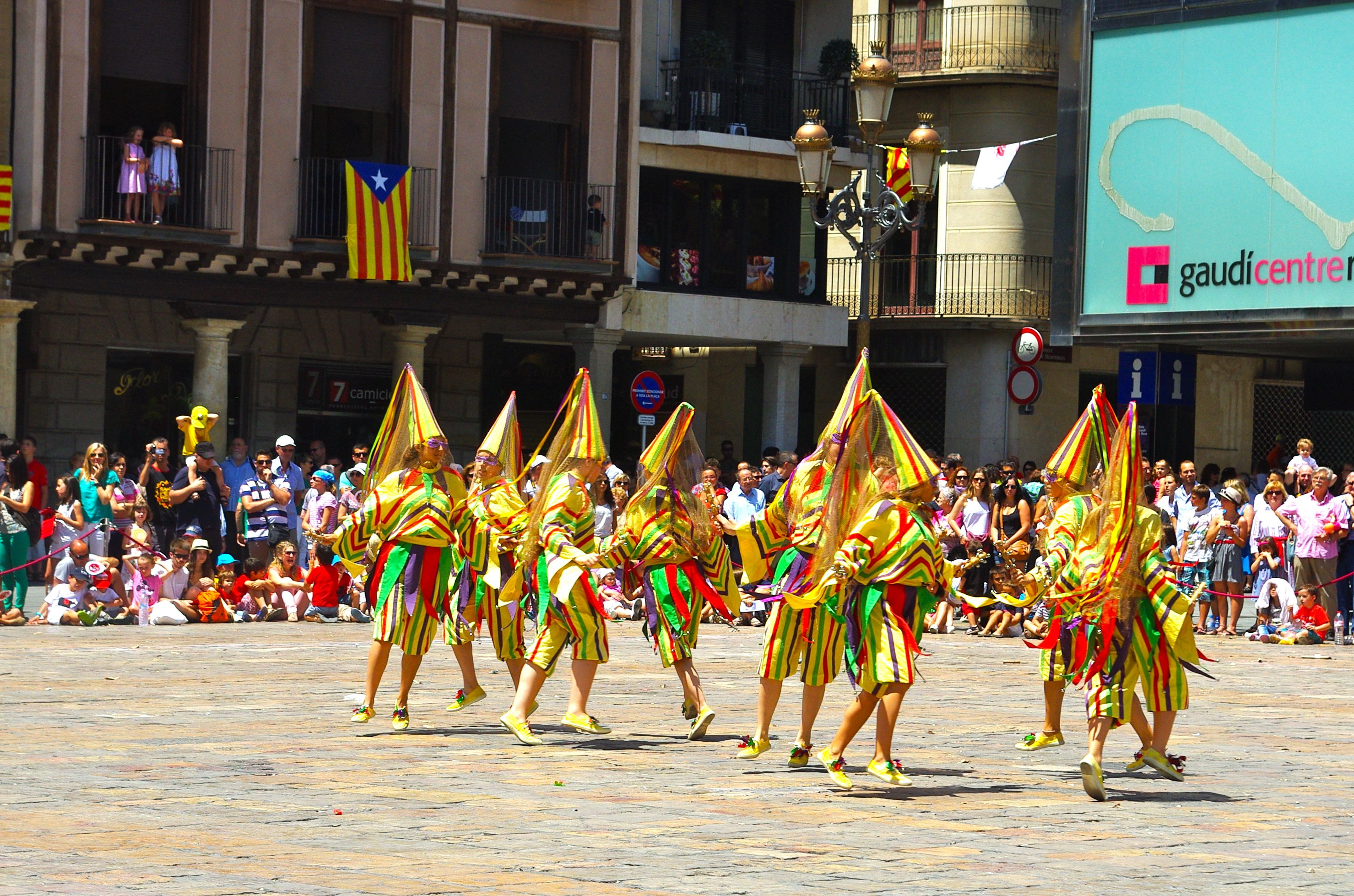 Ball de Prims. Sant Pere 2014